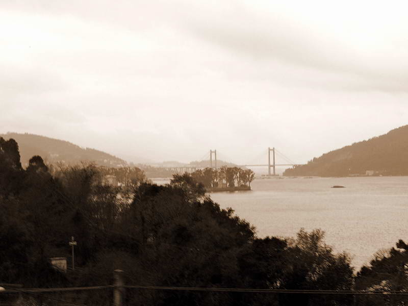 self made .Vigo - Galicia - Spain